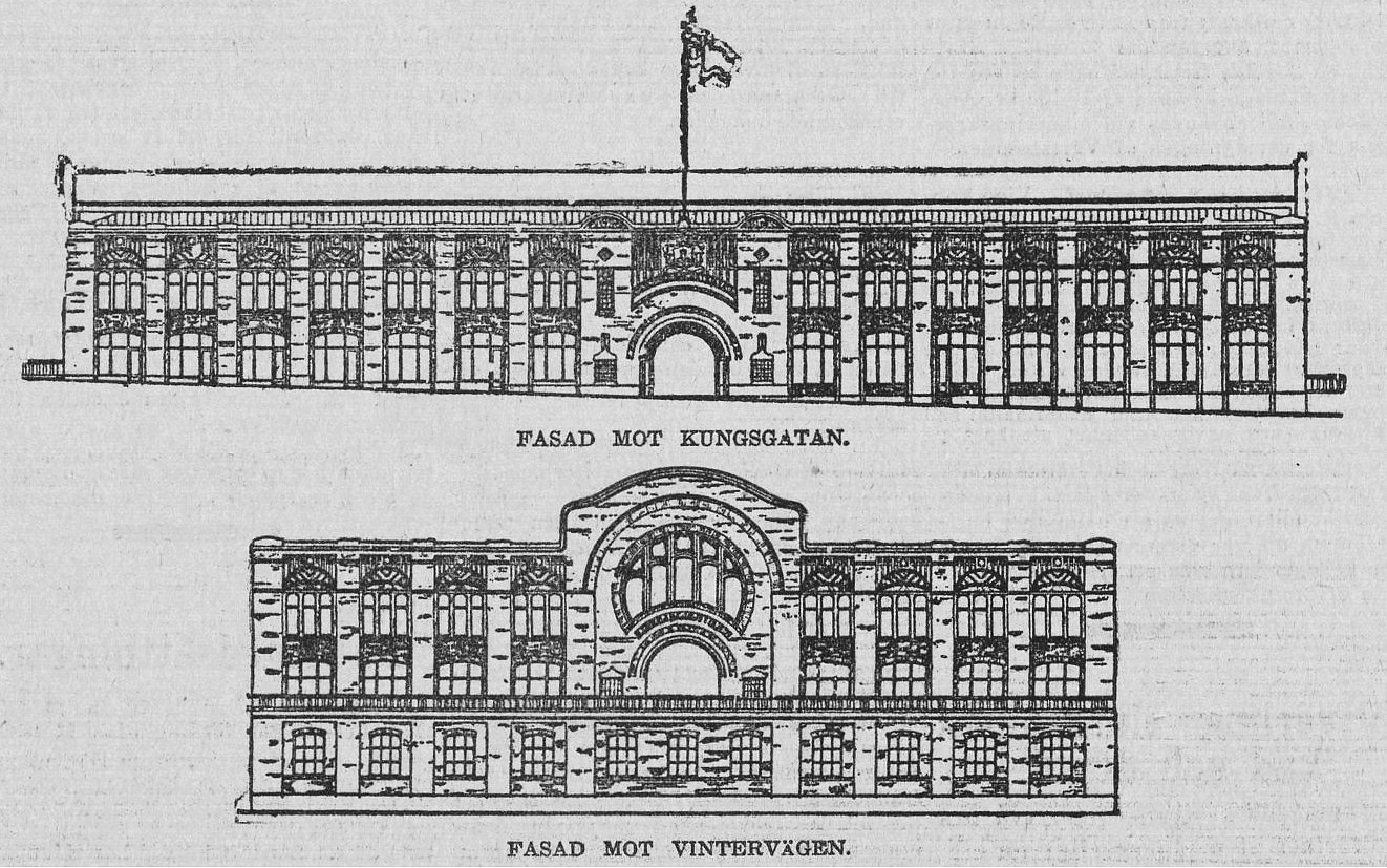 Förslag till Centralsaluhallen i Stockholm (ej utfört)